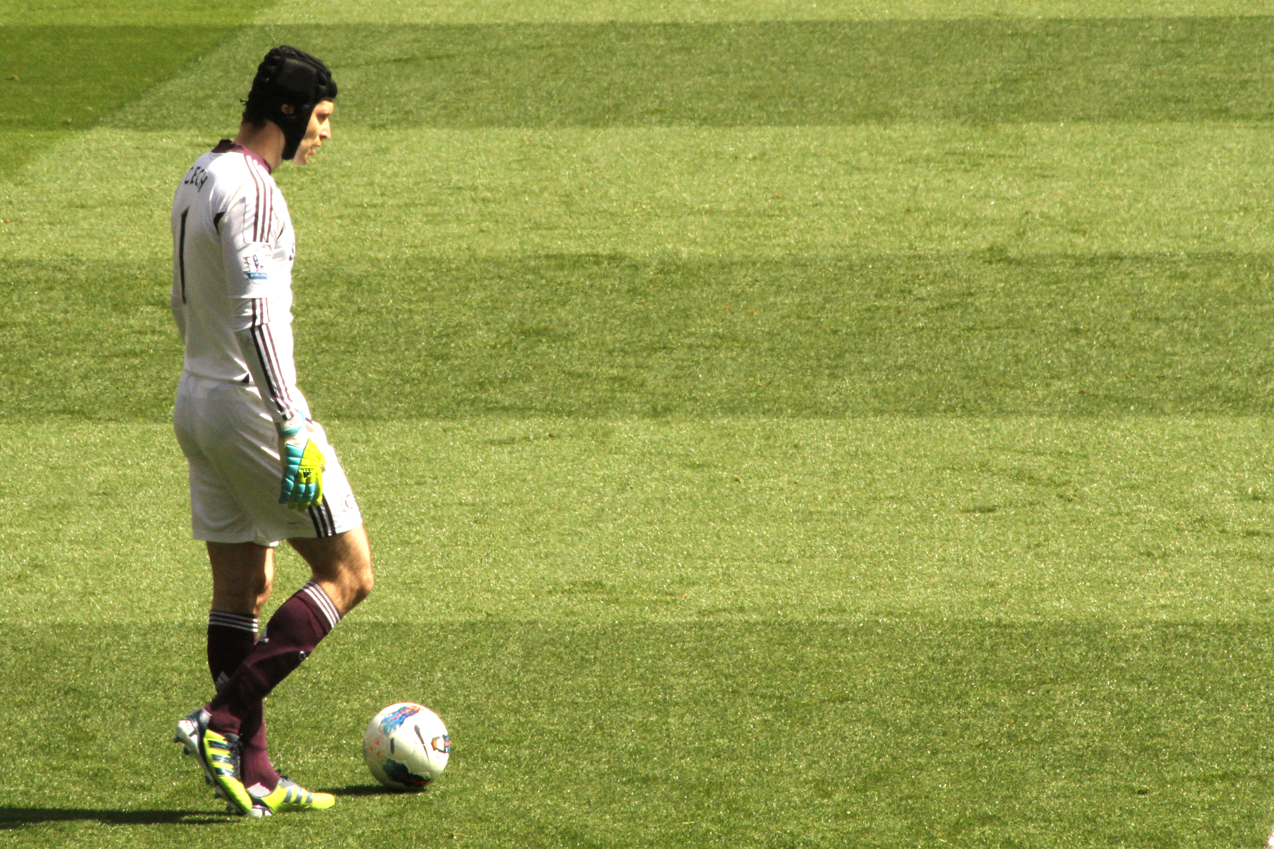 Petr Cech